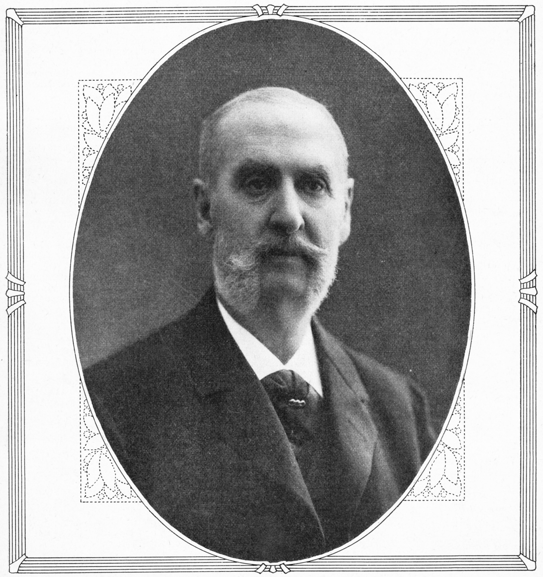 Fredrik Barnekow (1839-1912) på omslaget till Hvar 8 Dag 1912.